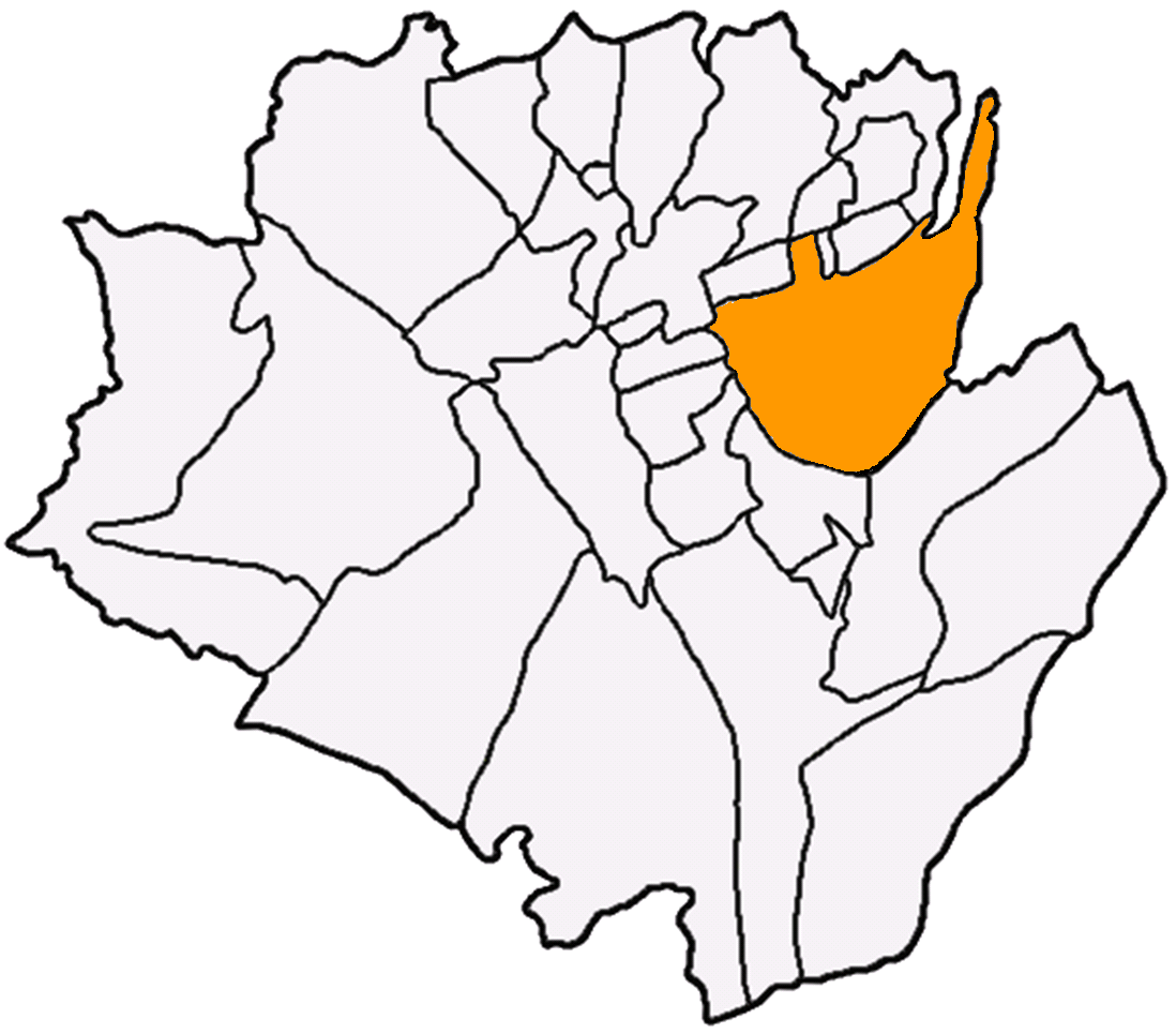 九龍里在龍潭區 (台灣)中的位置